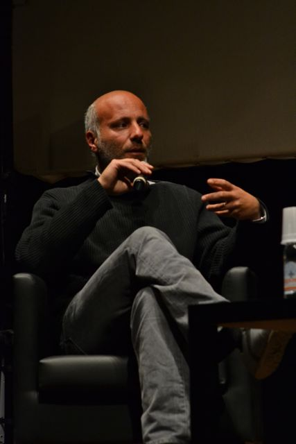 Carlo Bonini